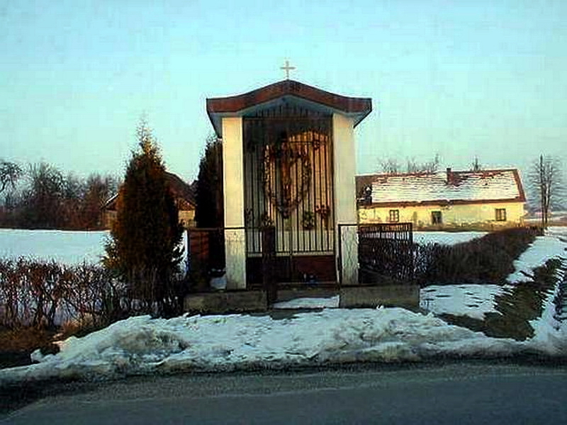 Ladina - Raspelo